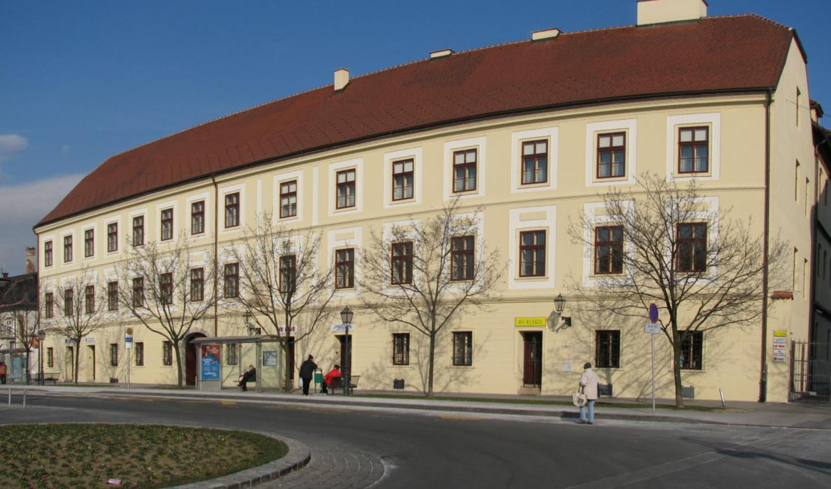 Nadbiskupsko sjemenište Kaptol 29, Zagreb